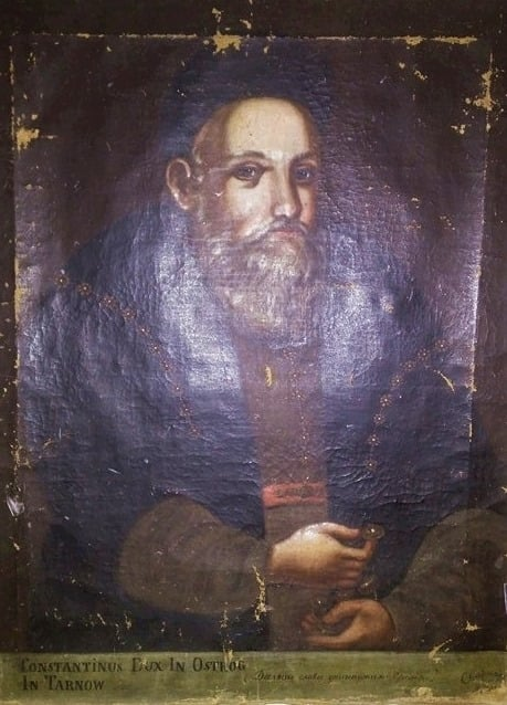 Беларуская (тарашкевіца): Партрэт Канстантына Васіля Астроскага (Kanstantyn Vasil Astroski)